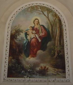 Church Messina Chiesa di Sant'Elia